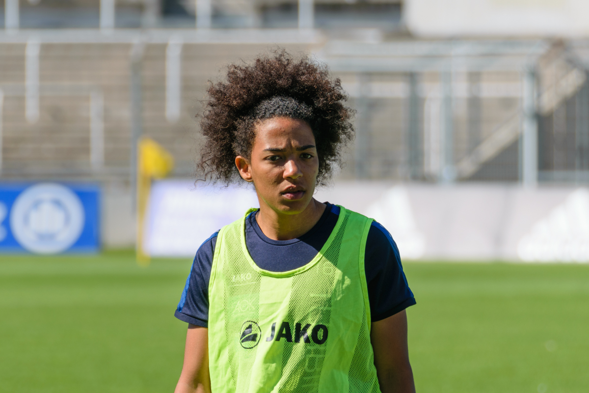 Eseosa Aigbogun vs Bayern Munchen - Frauenbundesliga